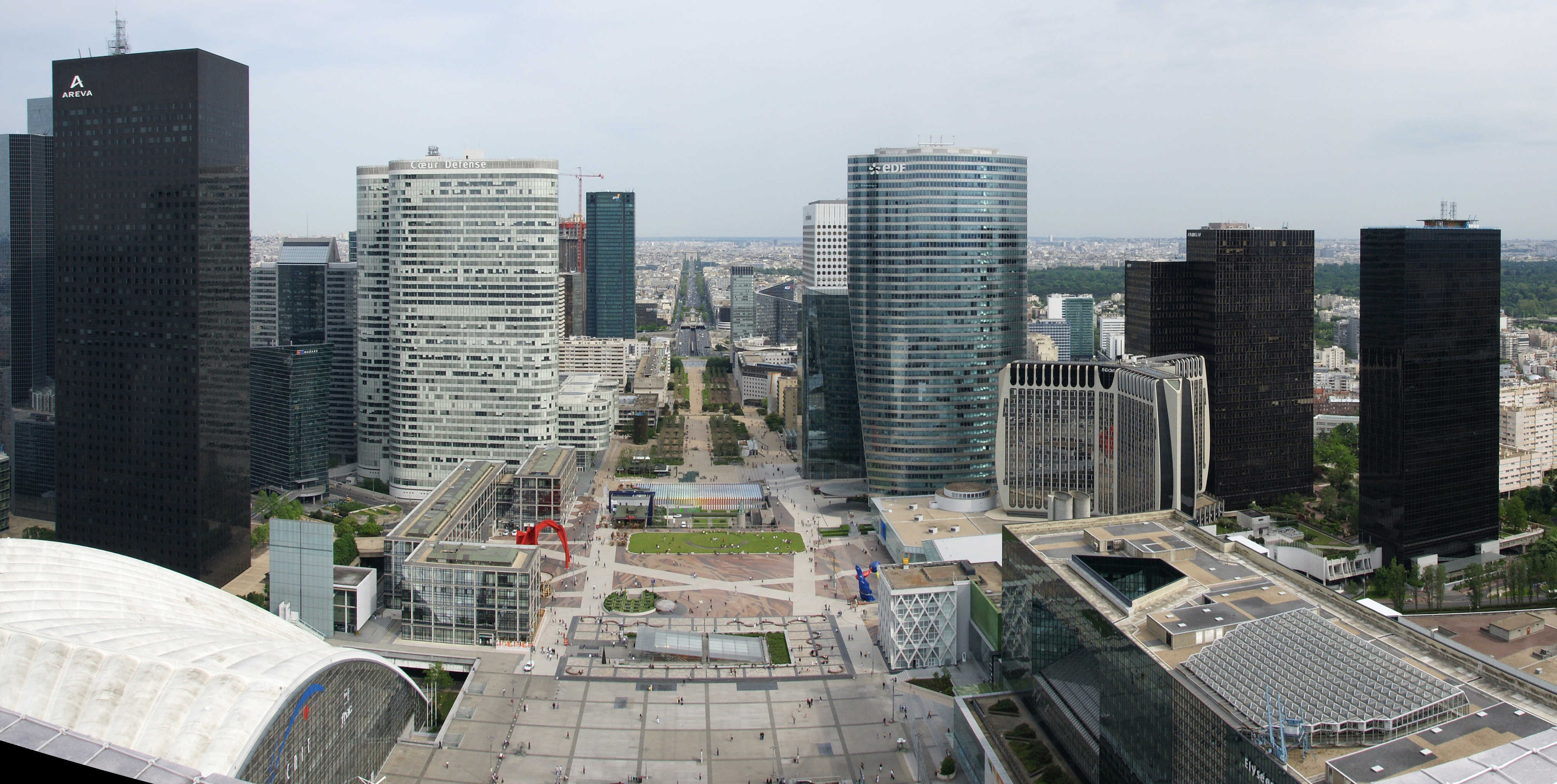 La Défense, vue du toit de la grande arche